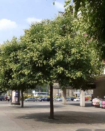 Ansicht vom Blasenbaum (Koelreuteria paniculata)